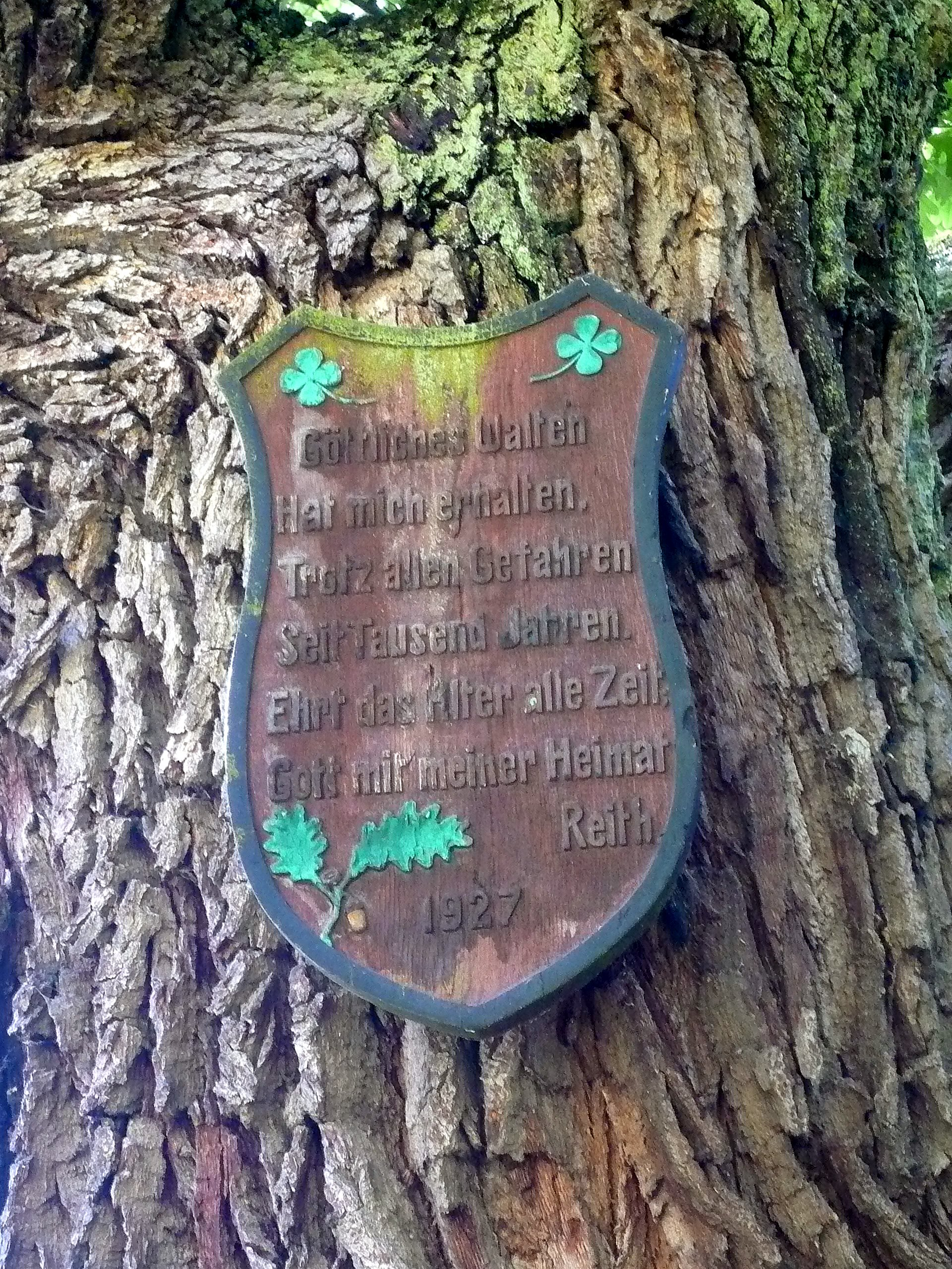 Reither Eiche, Tafel